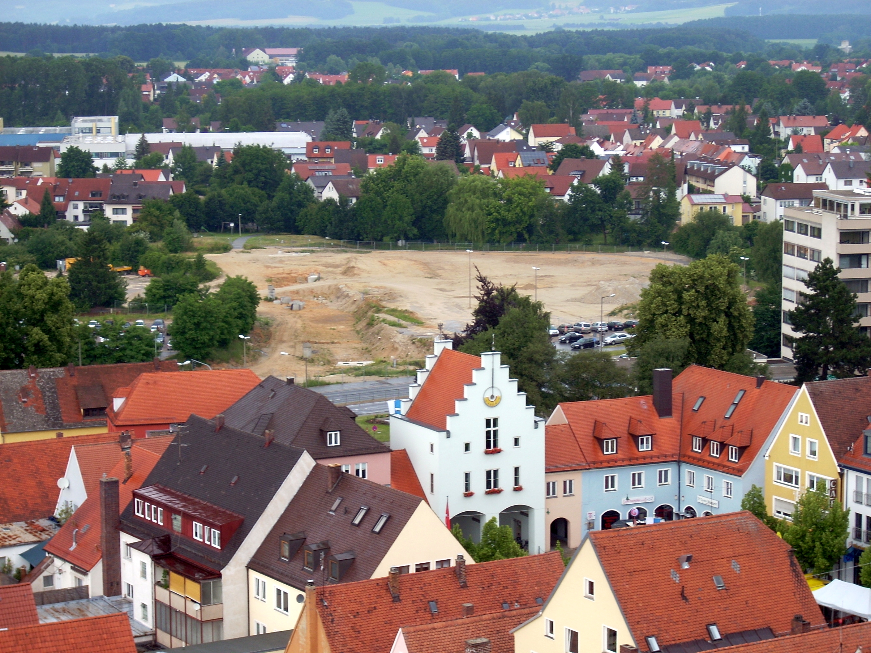 Neumarkt i.d.OPf: Brache am Unteren Tor